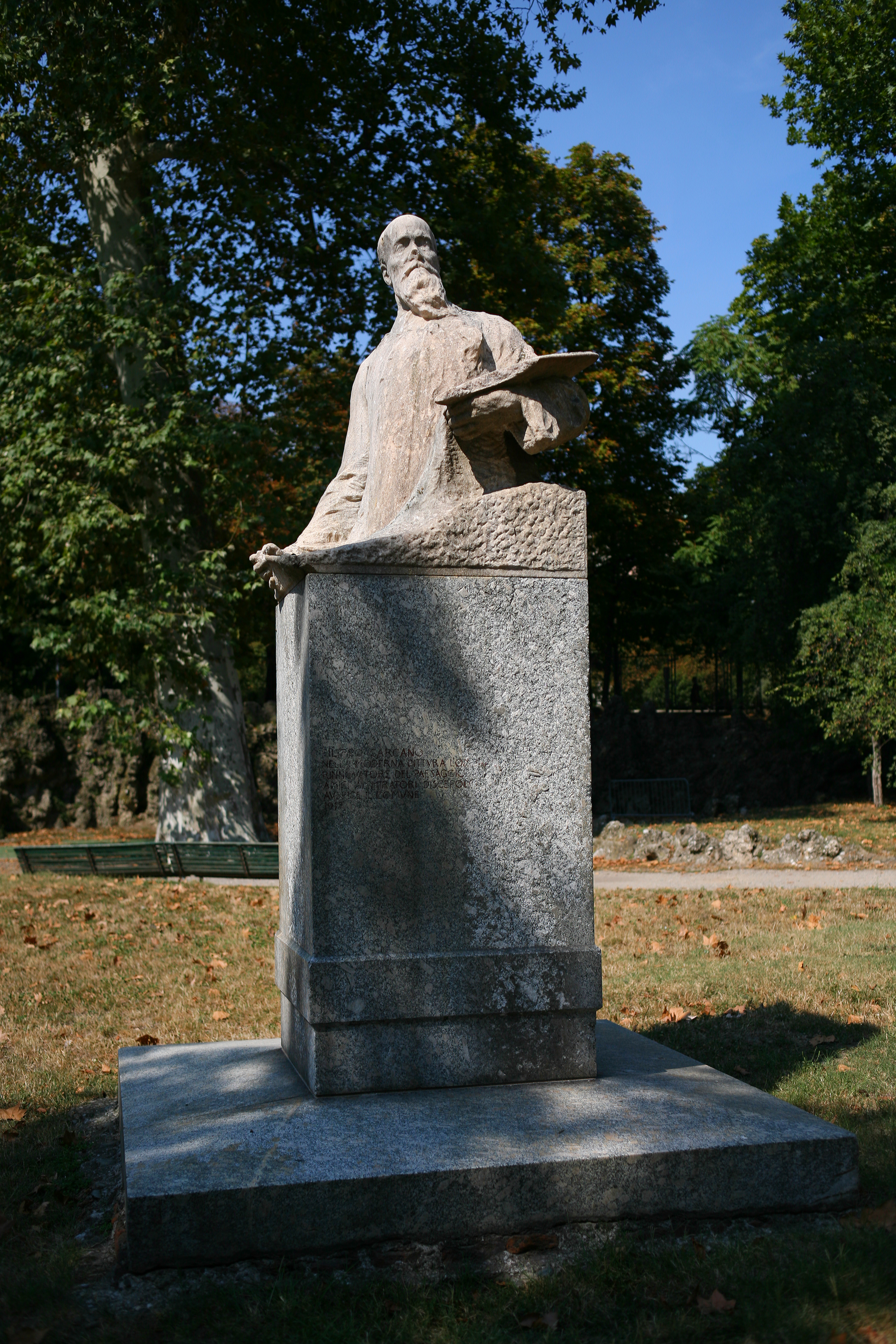 Monumento a Filippo Carcano (1915) ai Giardini di Porta Venezia, Milano, scultore Egidio Boninsegna